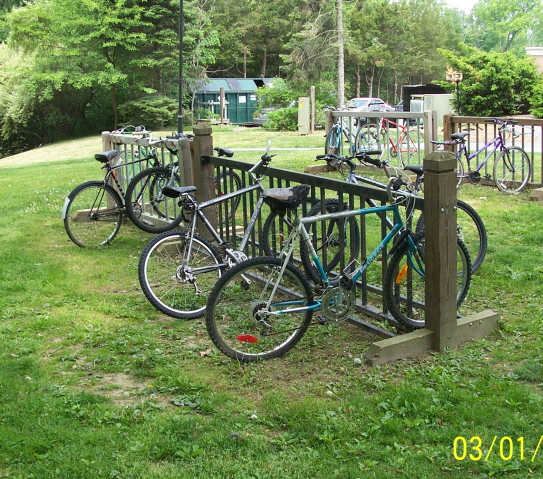 Bicycles